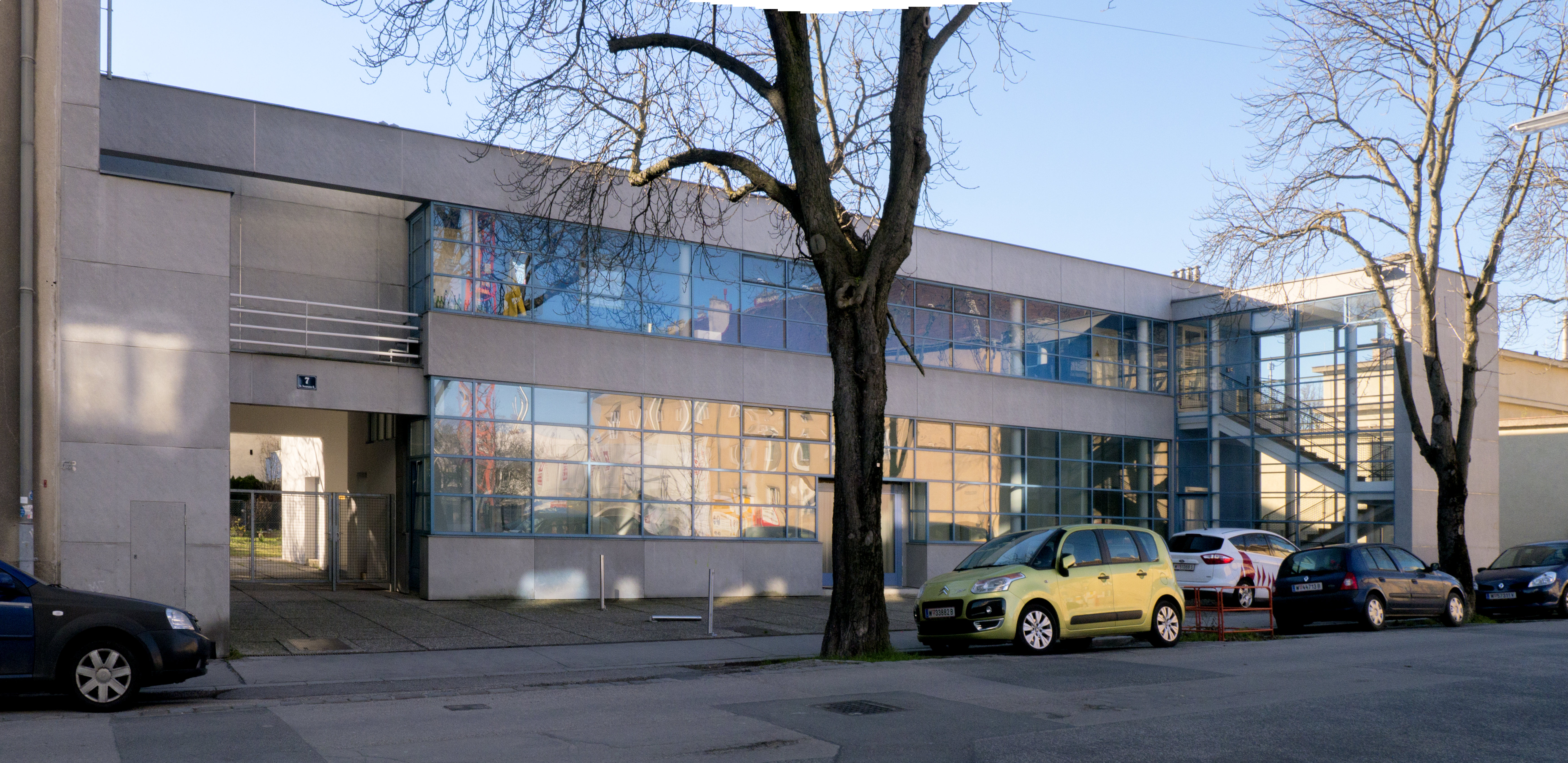 Wohnhaus, ehemaliges Arbeitsamt Liesing